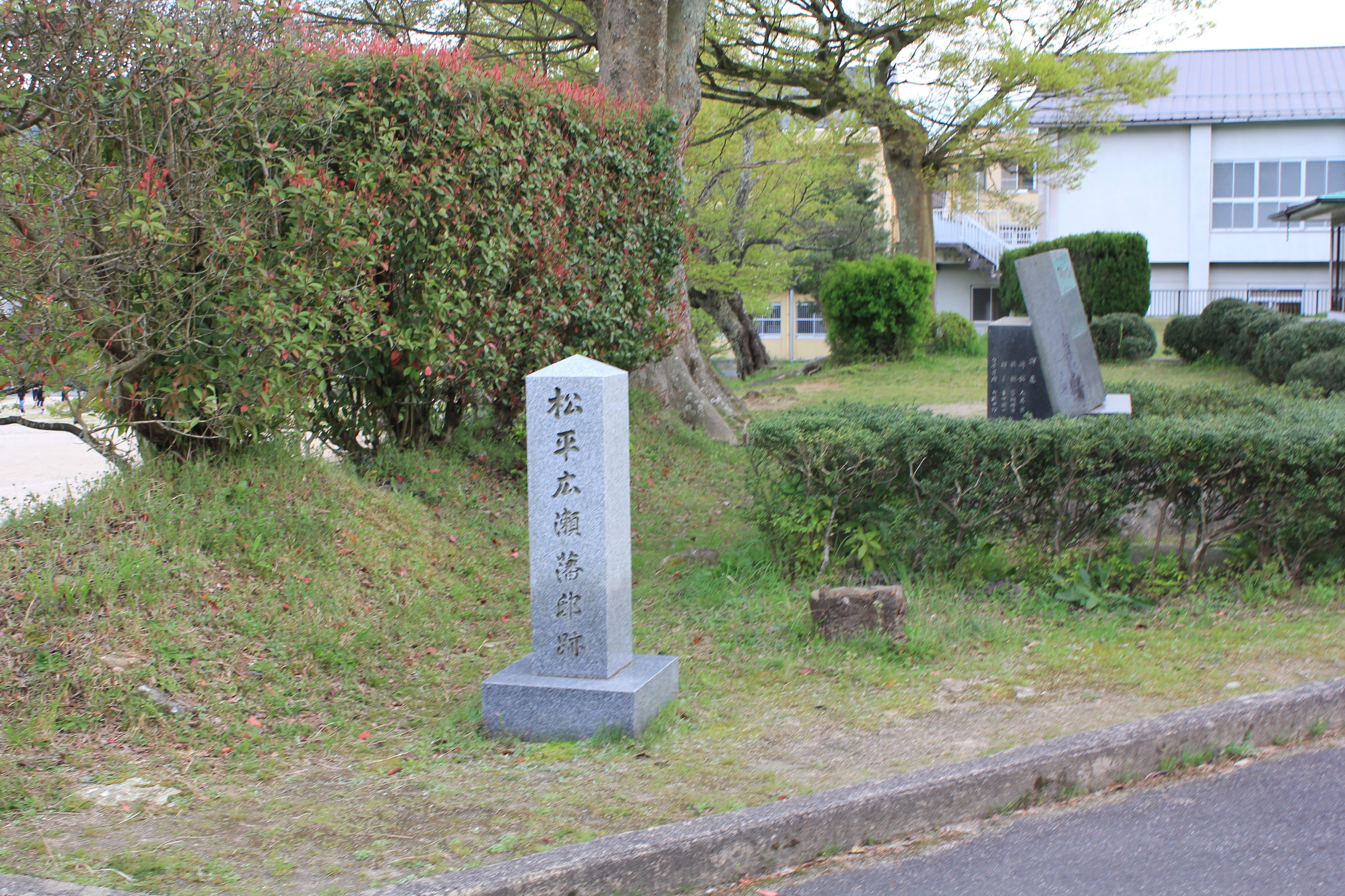 広瀬陣屋跡地を示す石碑